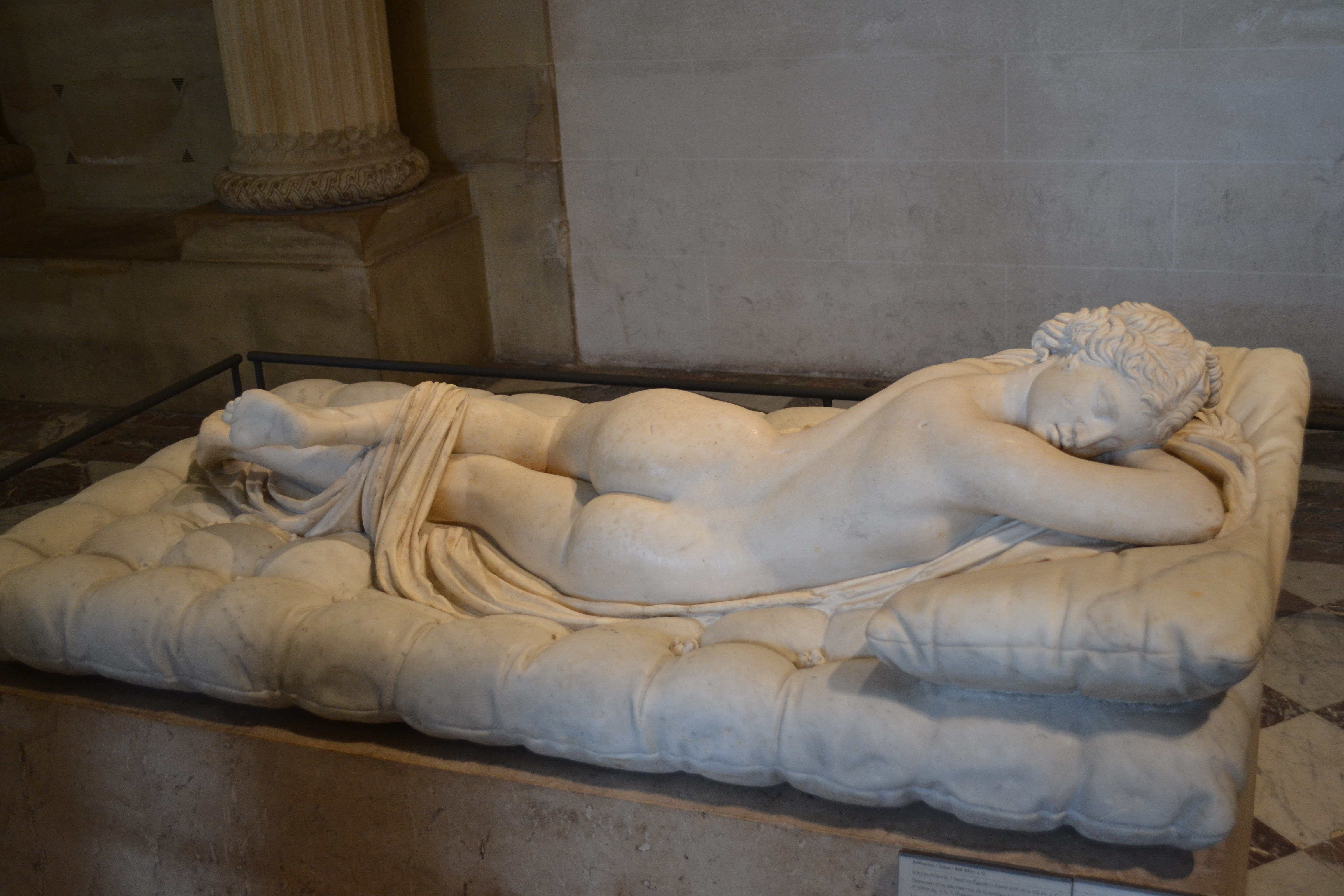 Hermaphrodite endormi, copie romaine du IIe siècle ap. J.-C. d'un marbre grec des années 150 av. J.-C. - découverte à Rome, près des thermes de Dioclétien. Le matelas, également en marbre, est l'œuvre du Bernin et date de 1619. L'ensemble est conservé au musée du Louvre (Achat, 1807, collection Borghèse. N° d'inv. MR 220 - n° usuel Ma 231.). La sculpture original - equelques Connoisseurs fondés sur un passage de Pline ont cru que le fameux Polyclète ou Polyclès.